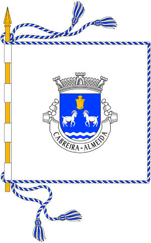 Drapeau Cabreira do Côa